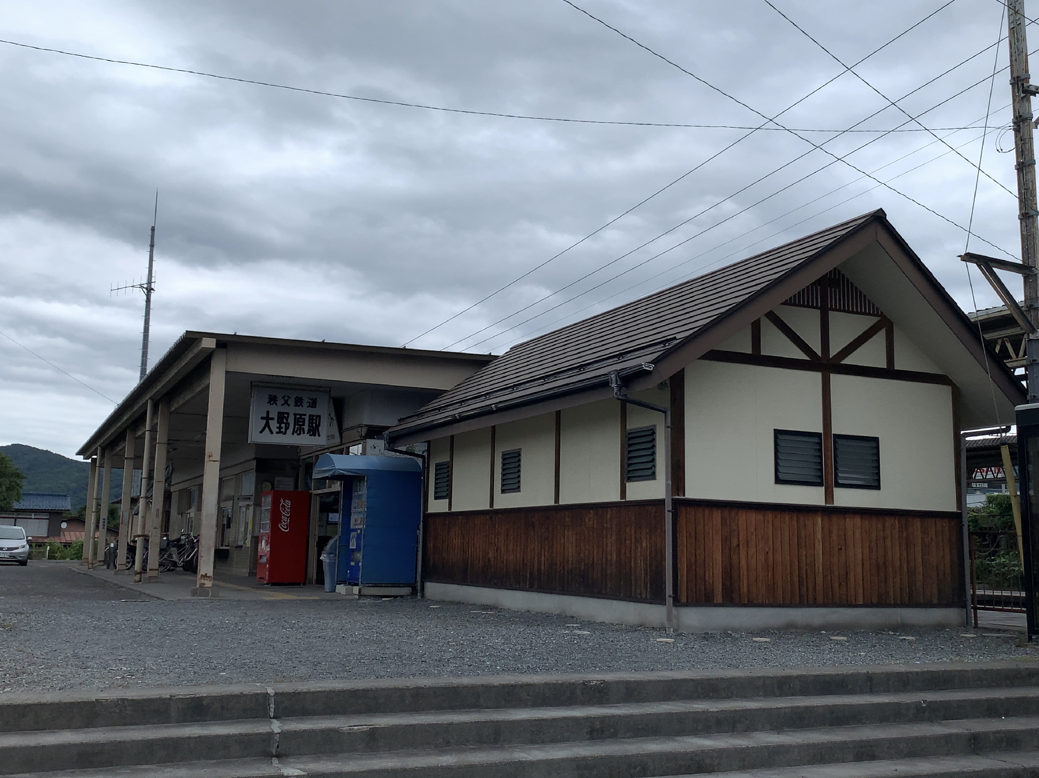 秩父鉄道 大野原駅 駅舎